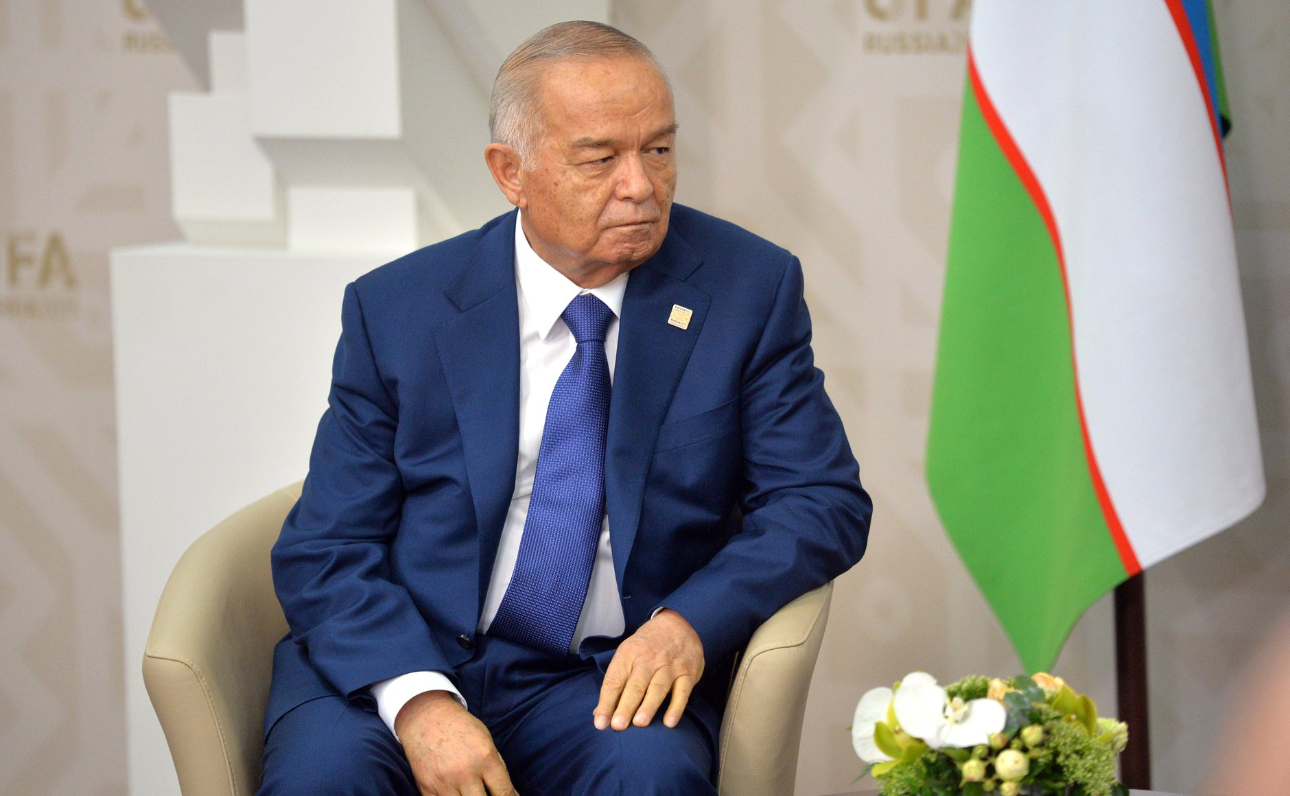 Президент Республики Узбекистан Ислам Каримов во время встречи с Президентом России Владимиром Путиным